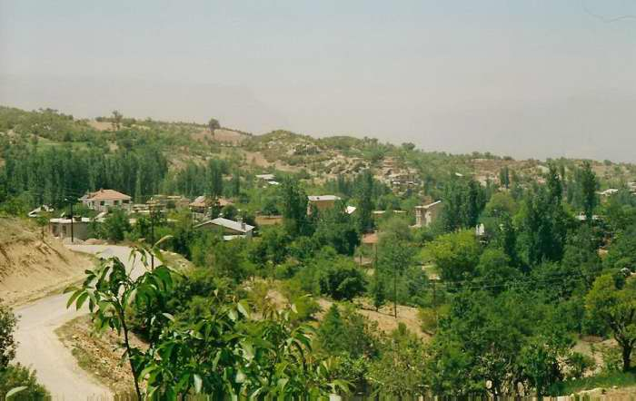 kişisel resim